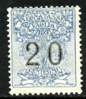 Immagine di un segnatasse per vaglia